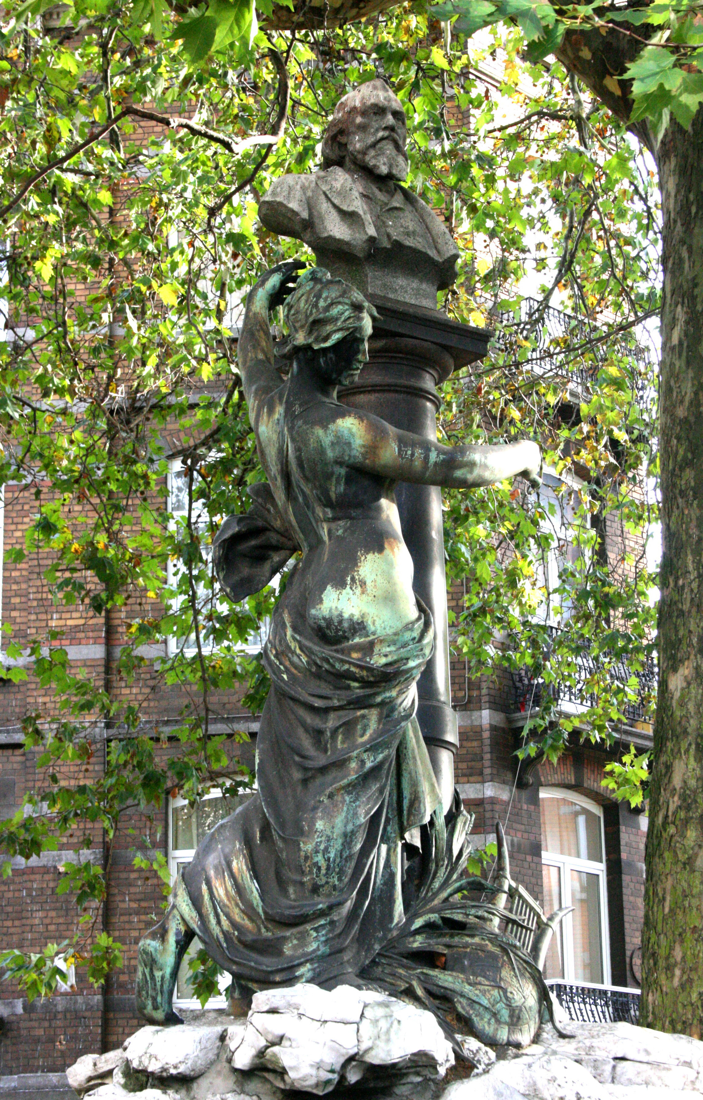 Place Pogge, Schaerbeek (Bruxelles), Belgique. Buste du poète Emmanuel Hiel